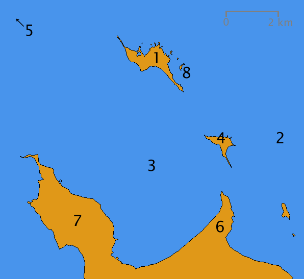 Rammu a okolní ostrovy a poloostrovy.